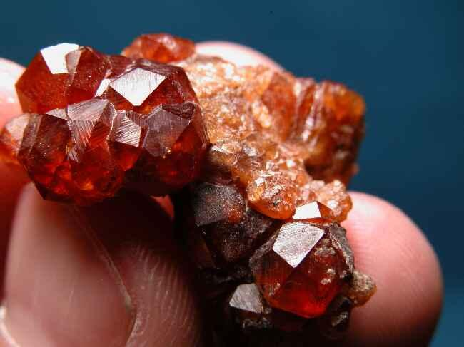 Granat, pochodzenie Chiny; autor zdjęcia Piotr Menducki